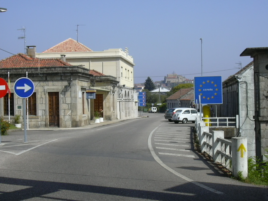 Saída da Ponte internacional sobre o Rio Minho, fronteira entre Espanha e Portugal (Tui e Valença do Minho)